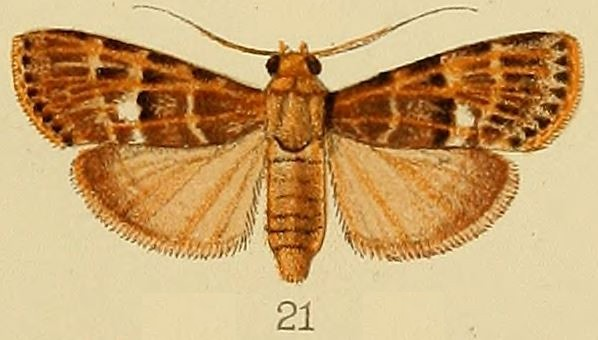 Lacalma porphyrealis (Kenrick, 1907)